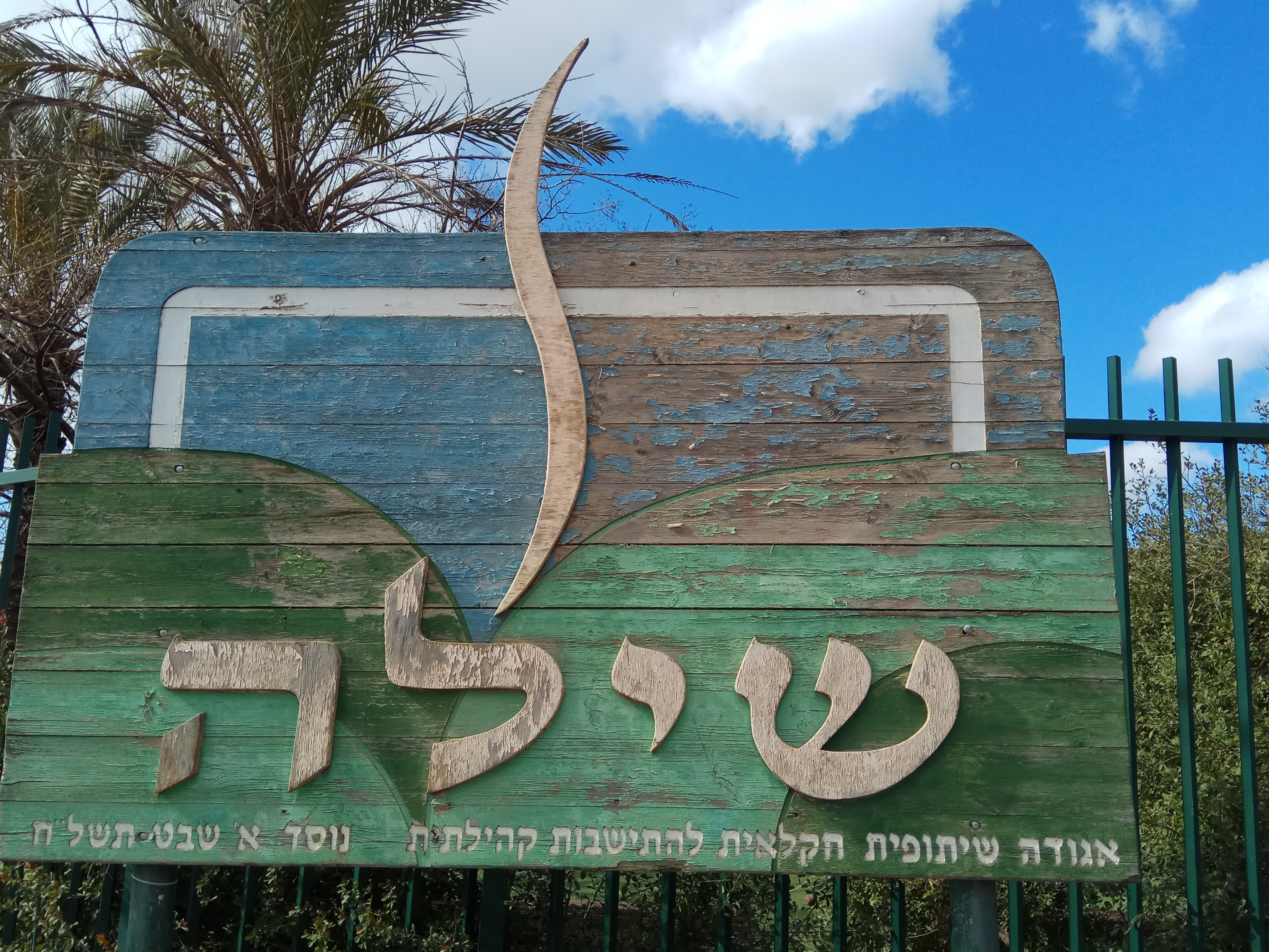 שלט בכניסה לשילה